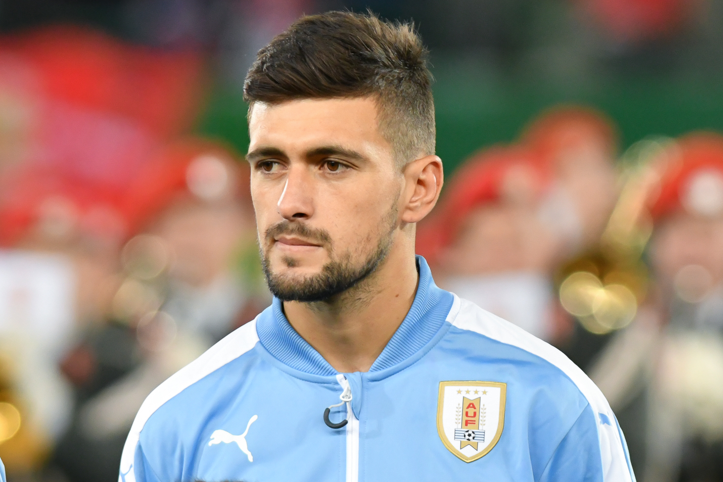 Wien, Österreich, 14.11.2017, Sport, Fussball, OEFB Freundschaftliches Laenderspiel - Österreich vs Uruguay. Bild zeigt Giorgian De Arrascaeta (URU).